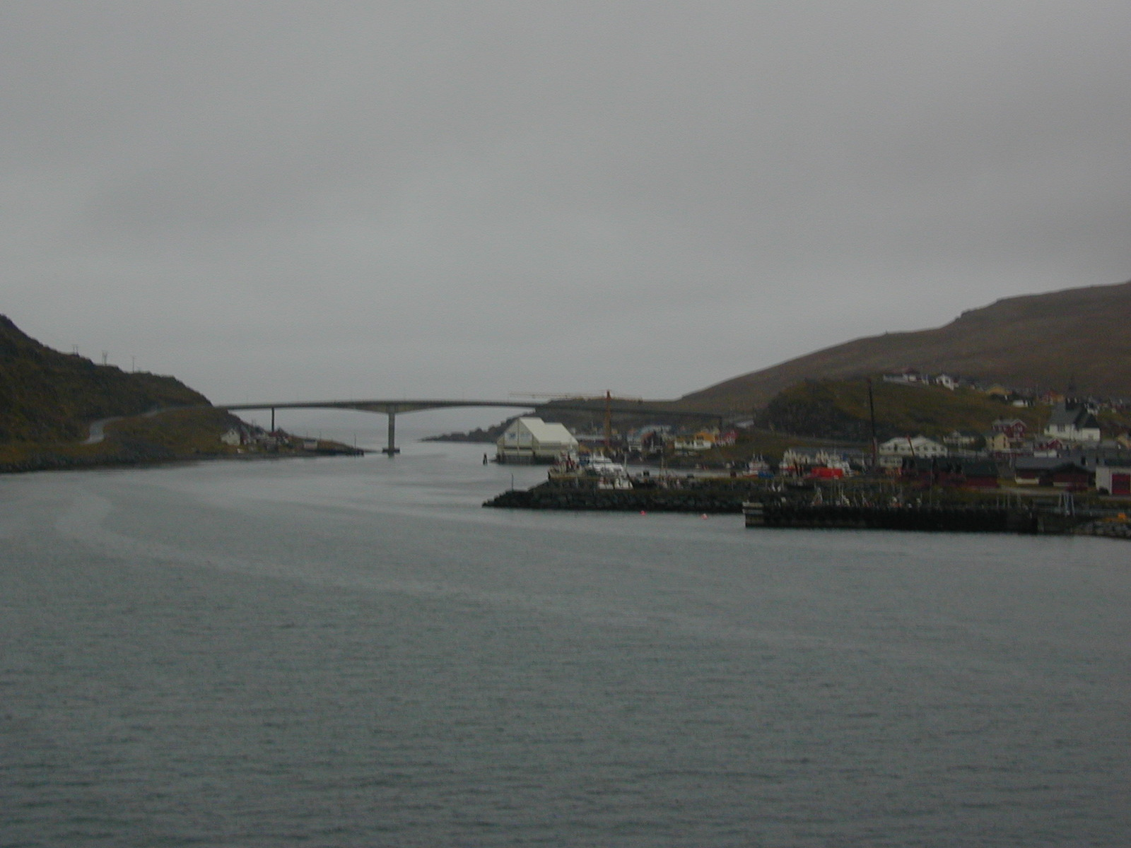 Havøysund seen from hurtigruta